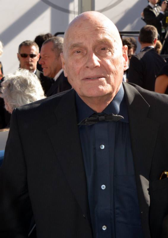 Barbet Schroeder au festival de Cannes